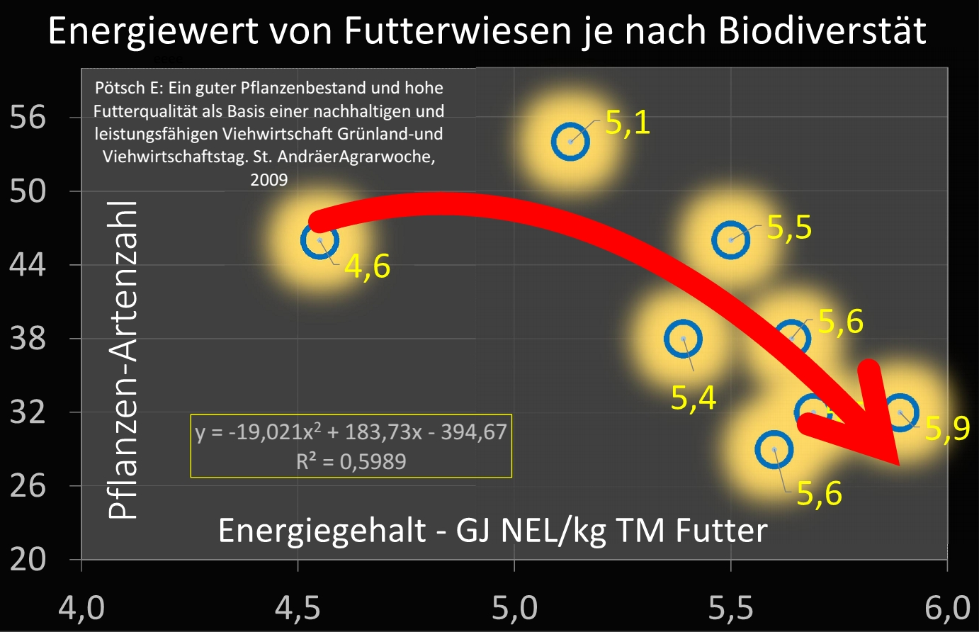 Energiewert von Futterwiesen je nach Alfa-Diversität der Pflanzenarten in Zentralösterreich